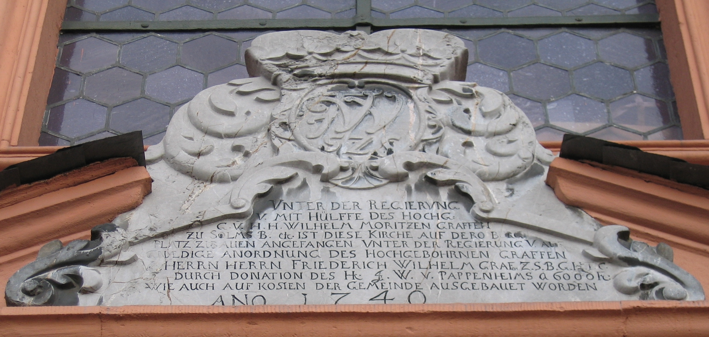 Inschrift über dem Mittelportal der Evangelisch-reformierten Kirche in Wölfersheim.